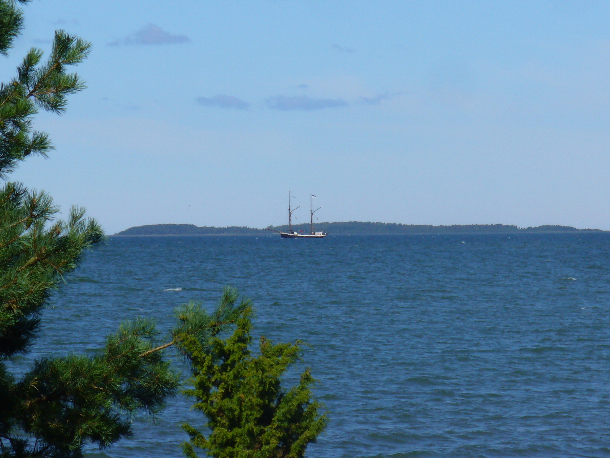 Small island Kõverlaid near Hiiumaa, Estonia. View from Muhu island.